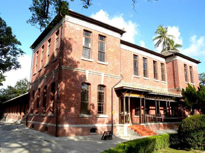 中文（台灣）: 臺南麻豆糖廠紅樓。